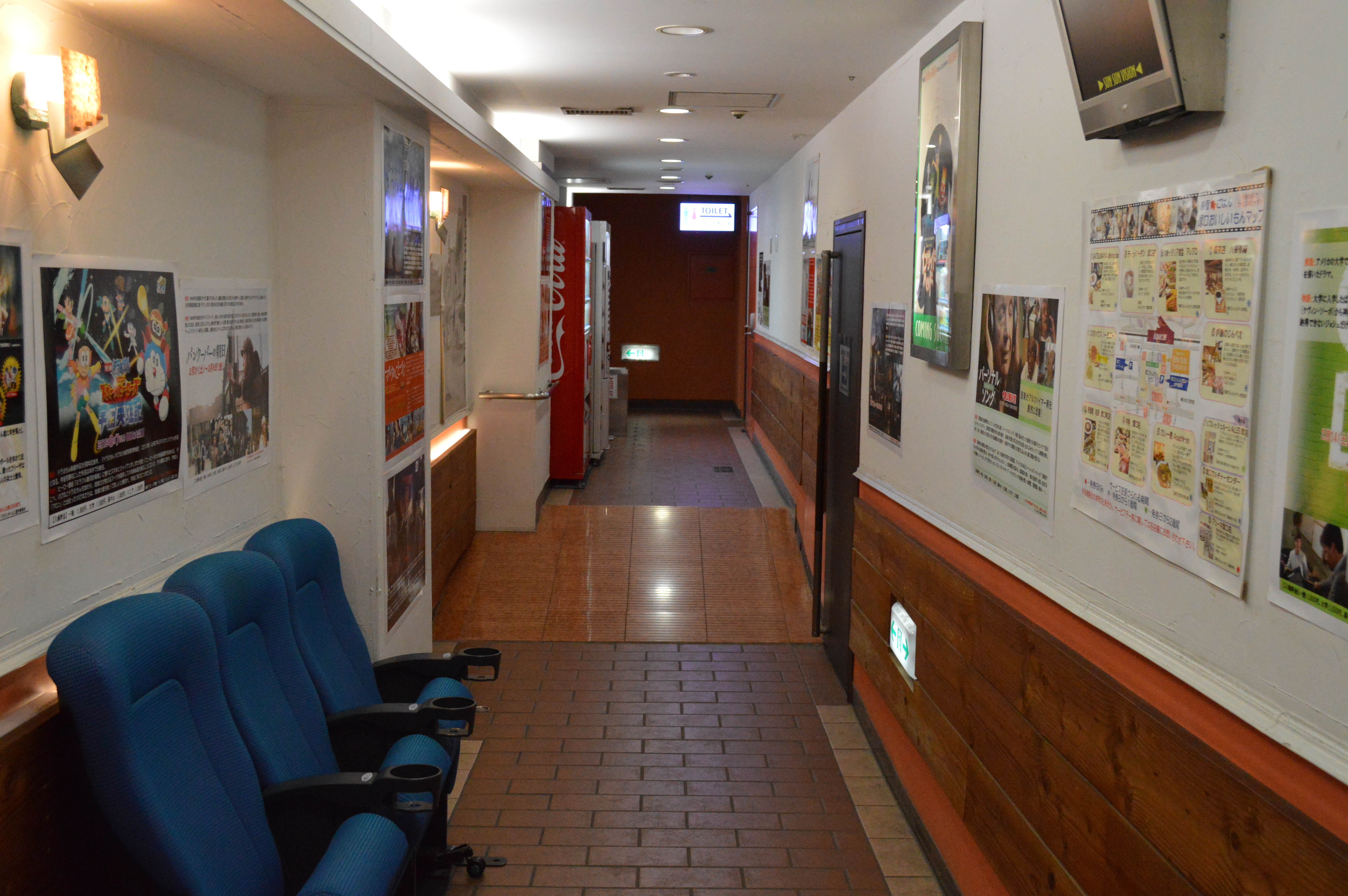 兵庫県尼崎市の映画館、塚口サンサン劇場